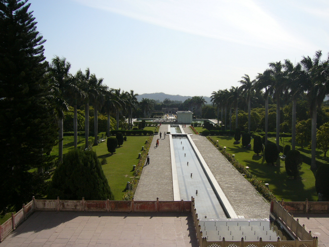 Pinjore Garden Chandigarh India